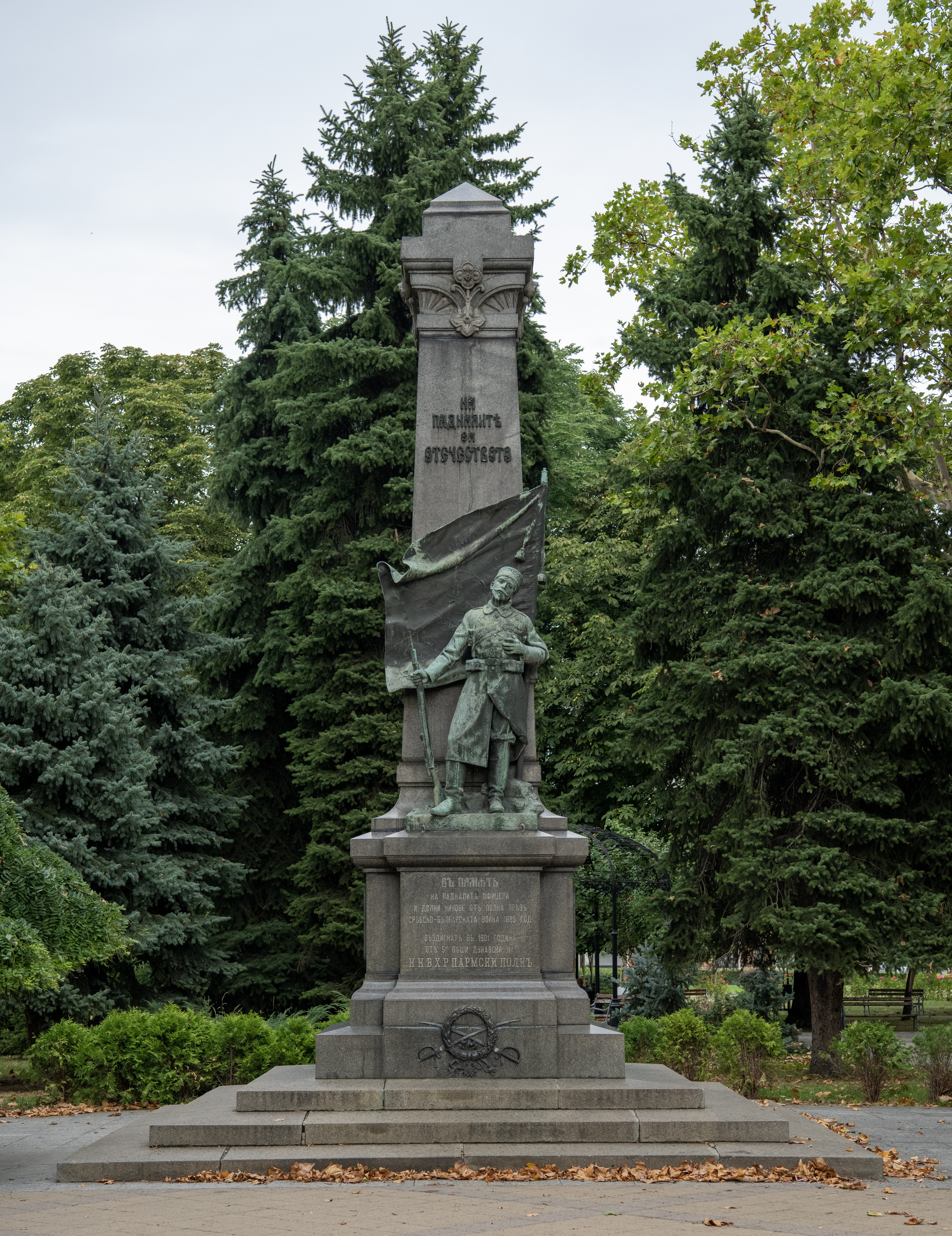 Снимката документира паметника на загиналите в Сръбско-българската война в град Русе.